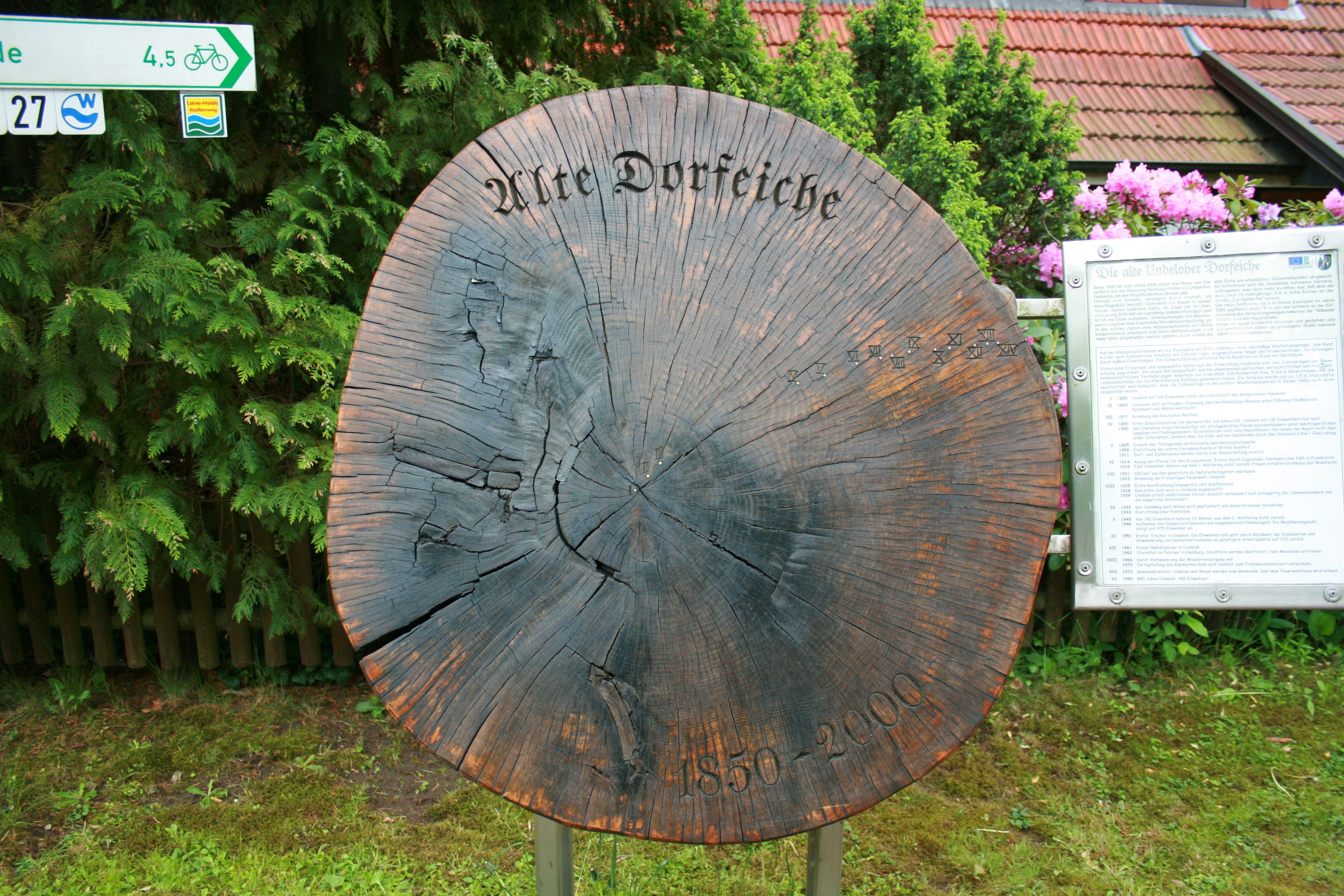 Ecke Zur Dorfeiche / Wilseder Straße in Undeloh